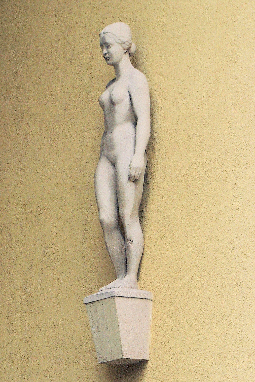 Aus dem Figurenzyklus Die Lebensalter am Universitätsklinikum Freiburg: Jungfrau von Ulrich Kottenrodt